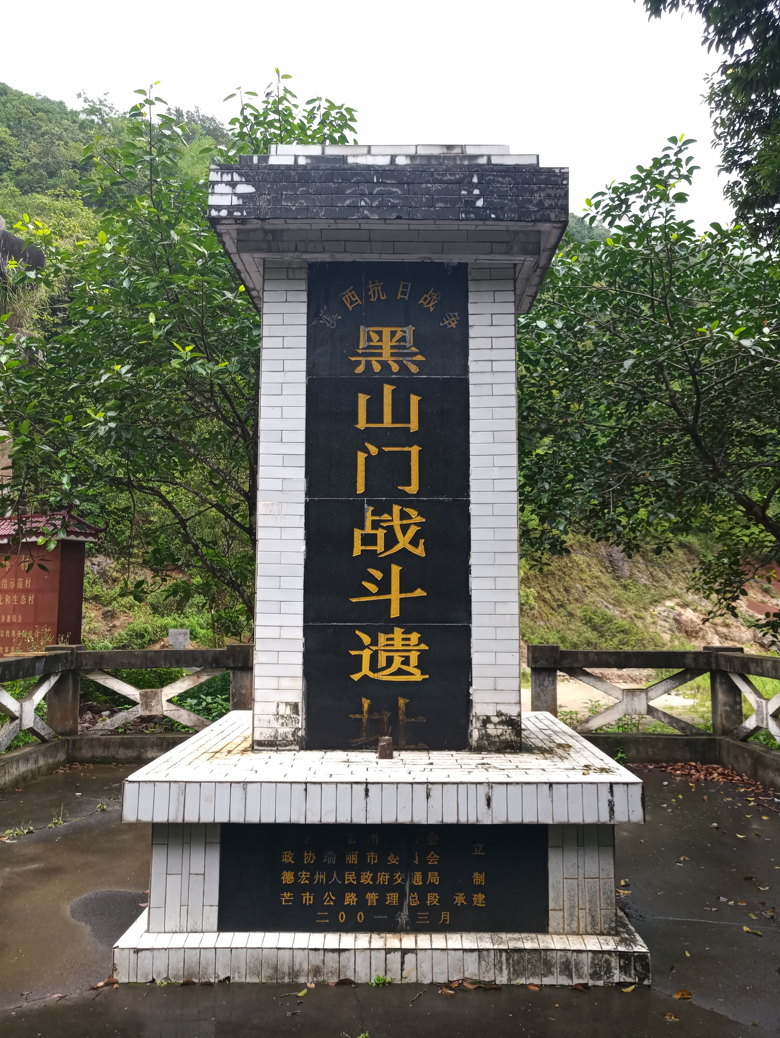 滇西抗日战争黑山门战斗遗址纪念碑